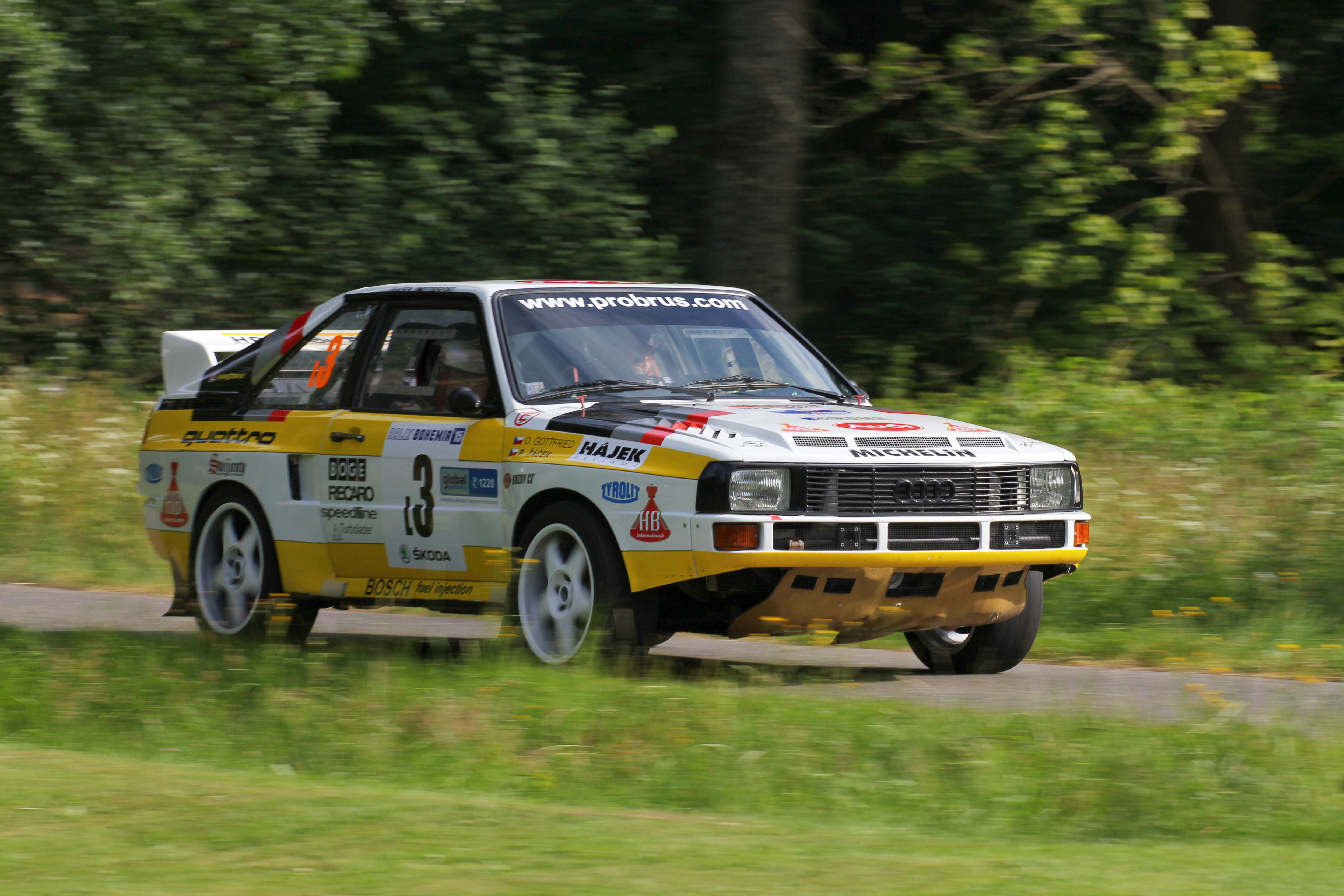 Rally Bohemia - Rally Legend